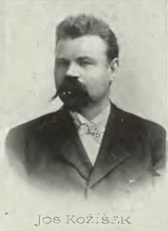 Portrét – Josef Kožíšek (1861-1933), Český básník a esperantista.